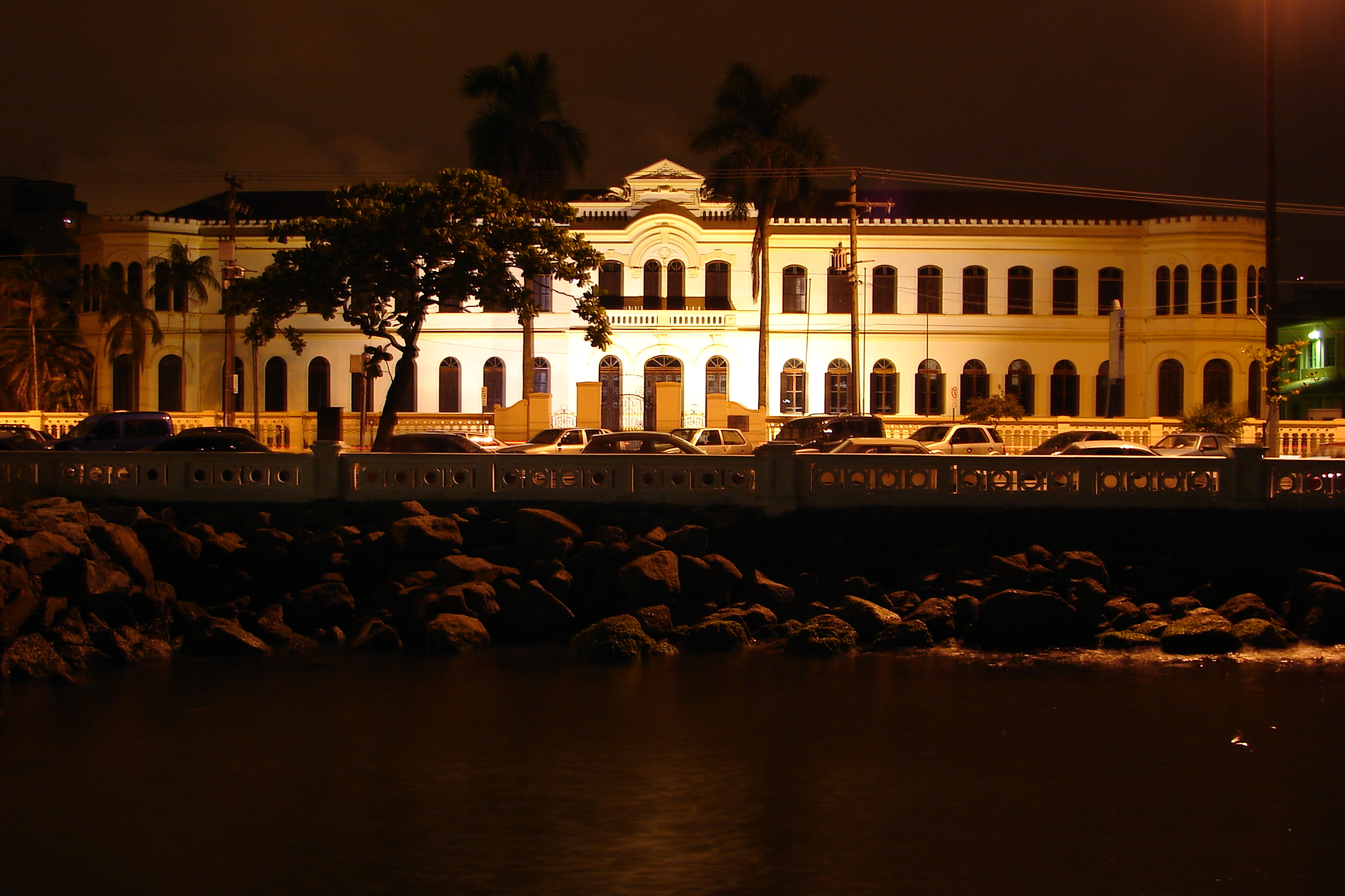 Museu de Pesca, em Santos, São Paulo, Brasil. Foto de Fabio Luiz A. Silva, tirada em 30 de dezembro de 2006.